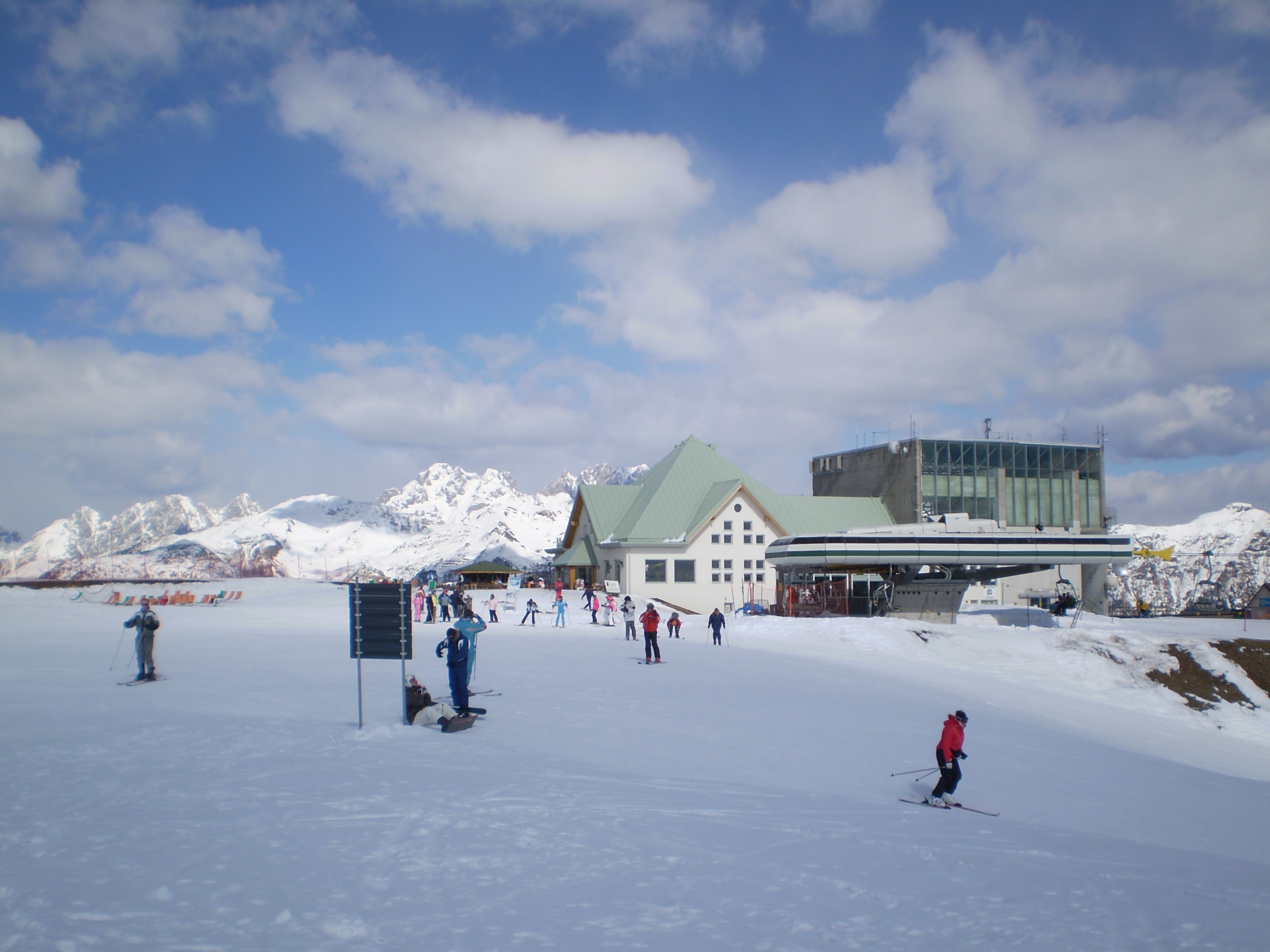 Der Gipfel des Monte Zoncolan mit den Aufstiegsanlagen